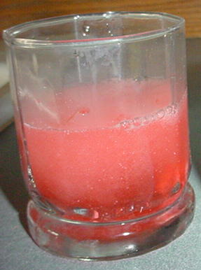 Alka-Seltzer Plus dissolved in water.